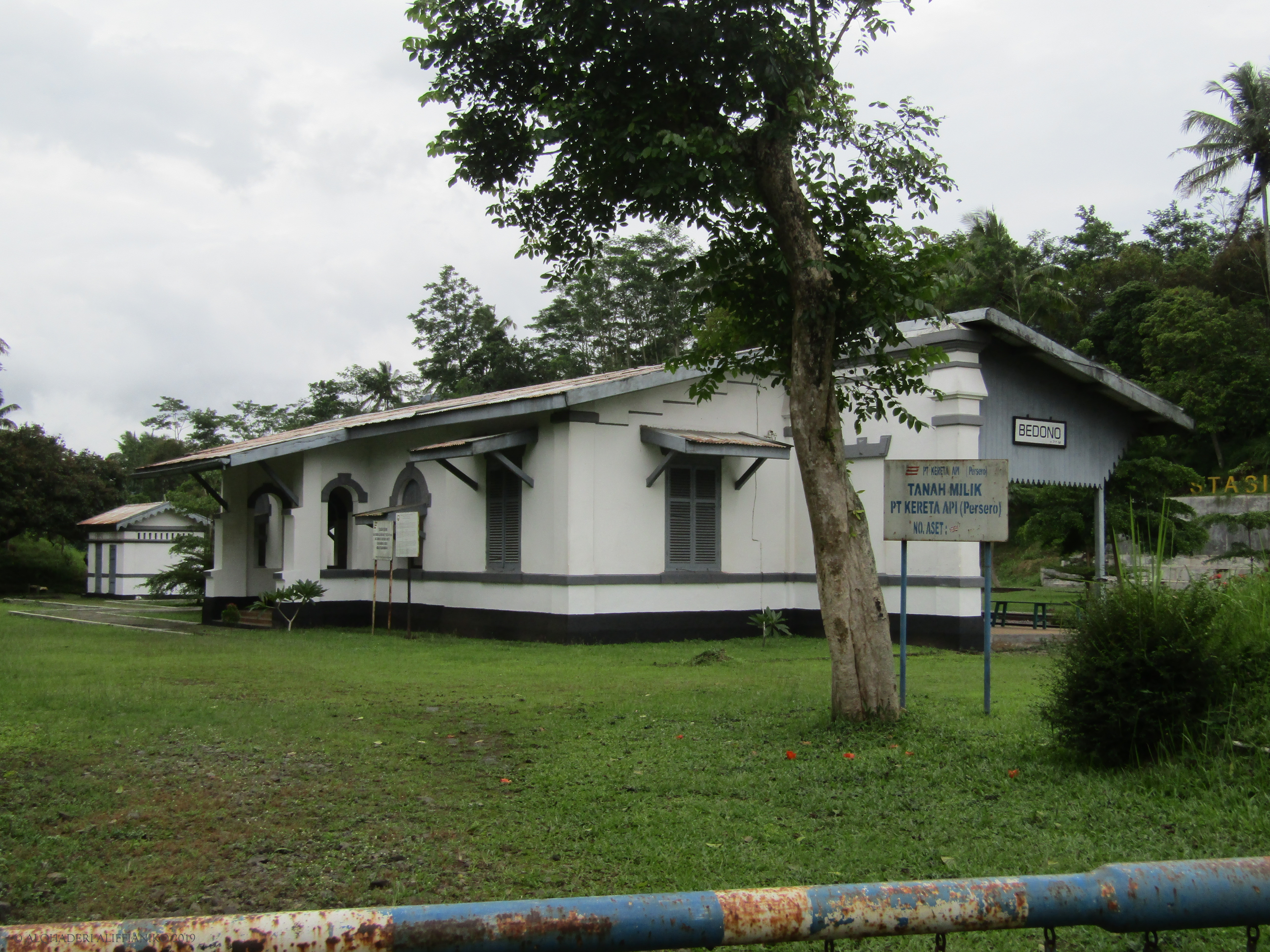 Tampak depan perspektif Stasiun Bedono, 2019